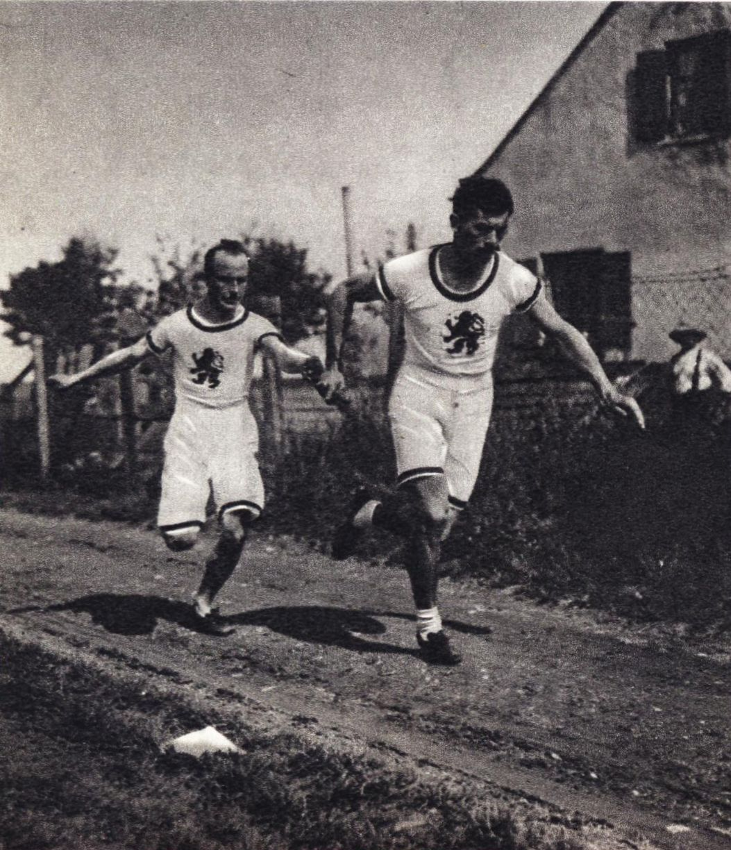 Josef Waitzer (r.), training for Olympics in 1911